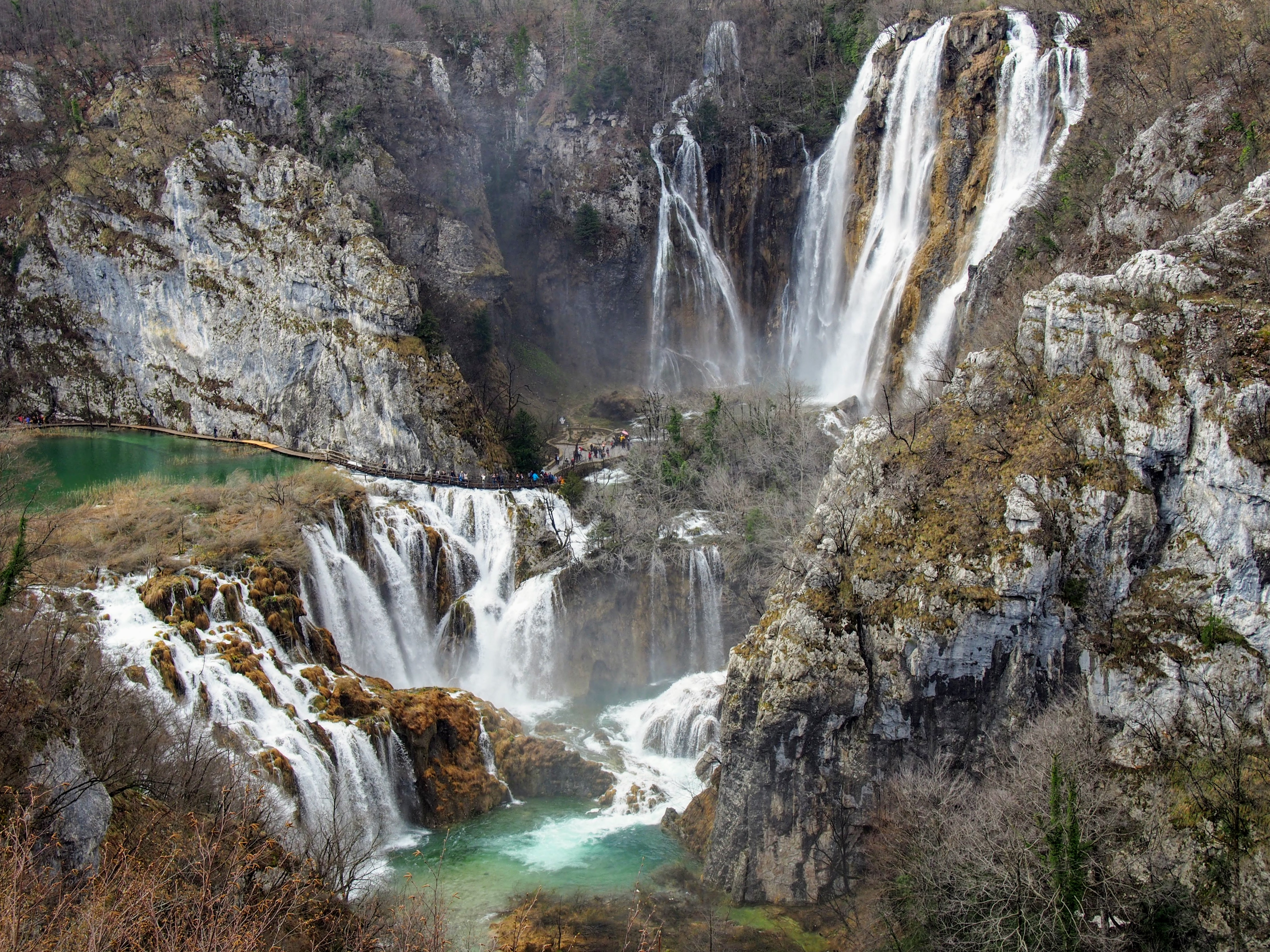 Plitvička jezera This is a a photo of a natural area in Croatia with ID: NP06